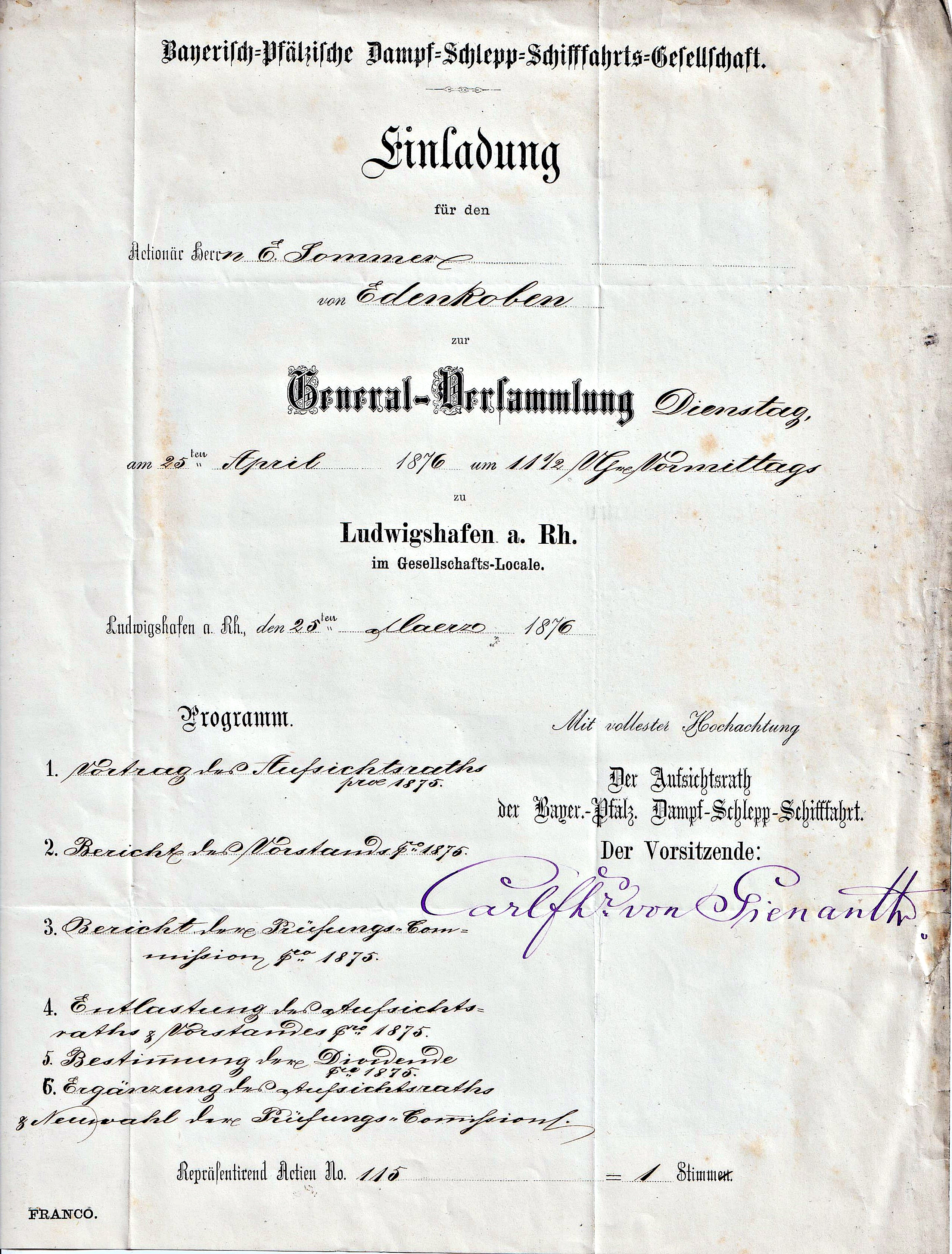 Einladung zur Aktionärsversammlung der Bayerisch-Pfälzischen Dampf-Schlepp-Schifffahrts-Gesellschaft, Ludwigshafen, 1876. Eigener Scan